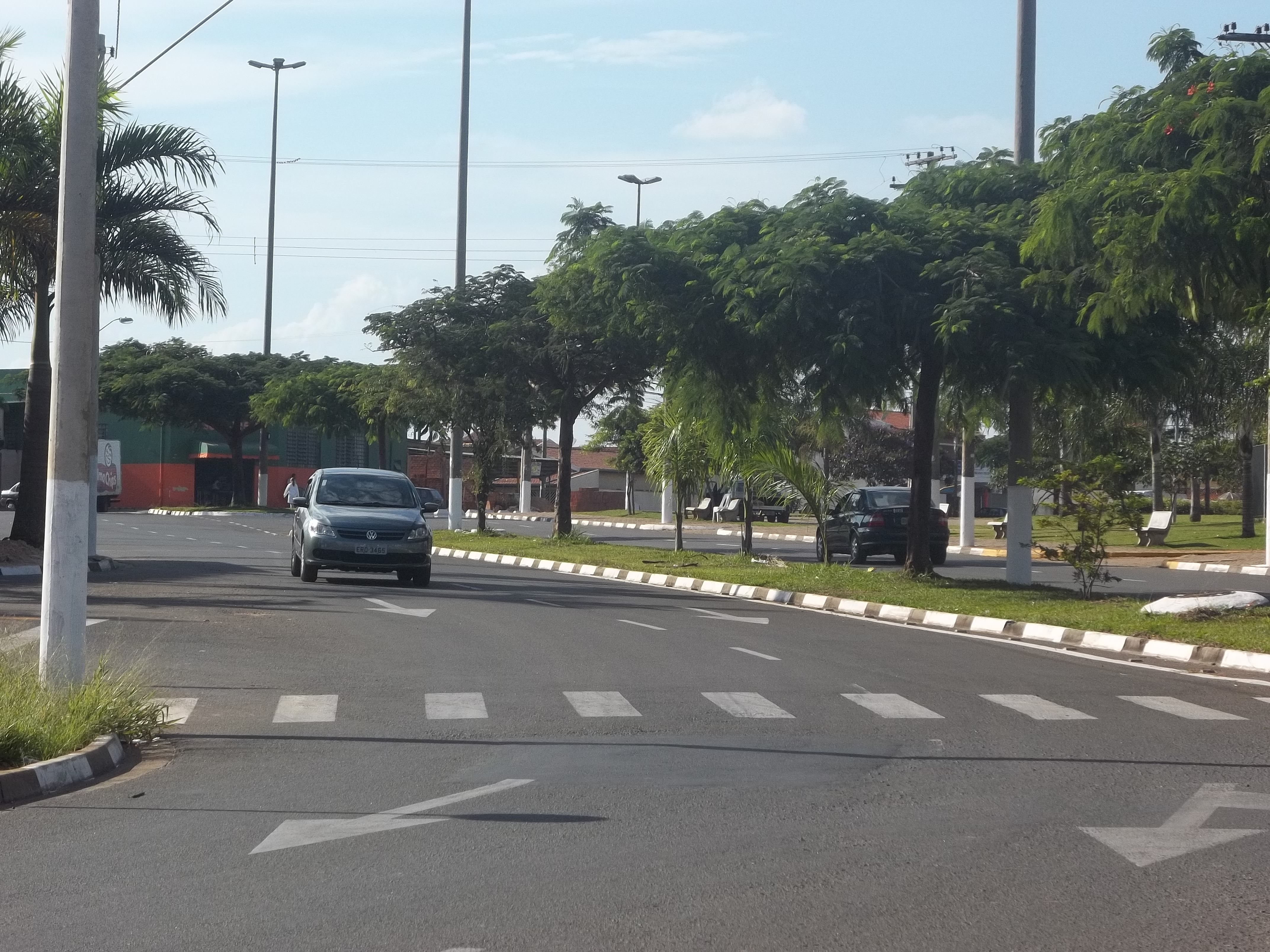 Vista da Avenida Regina Basseto Bordignon, antiga avenida 2, localizada no loteamento Residencial Nova Paulínia, mais conhecido como Sâo José I, no bairro São José, cidade de Paulínia, SP, Brasil.